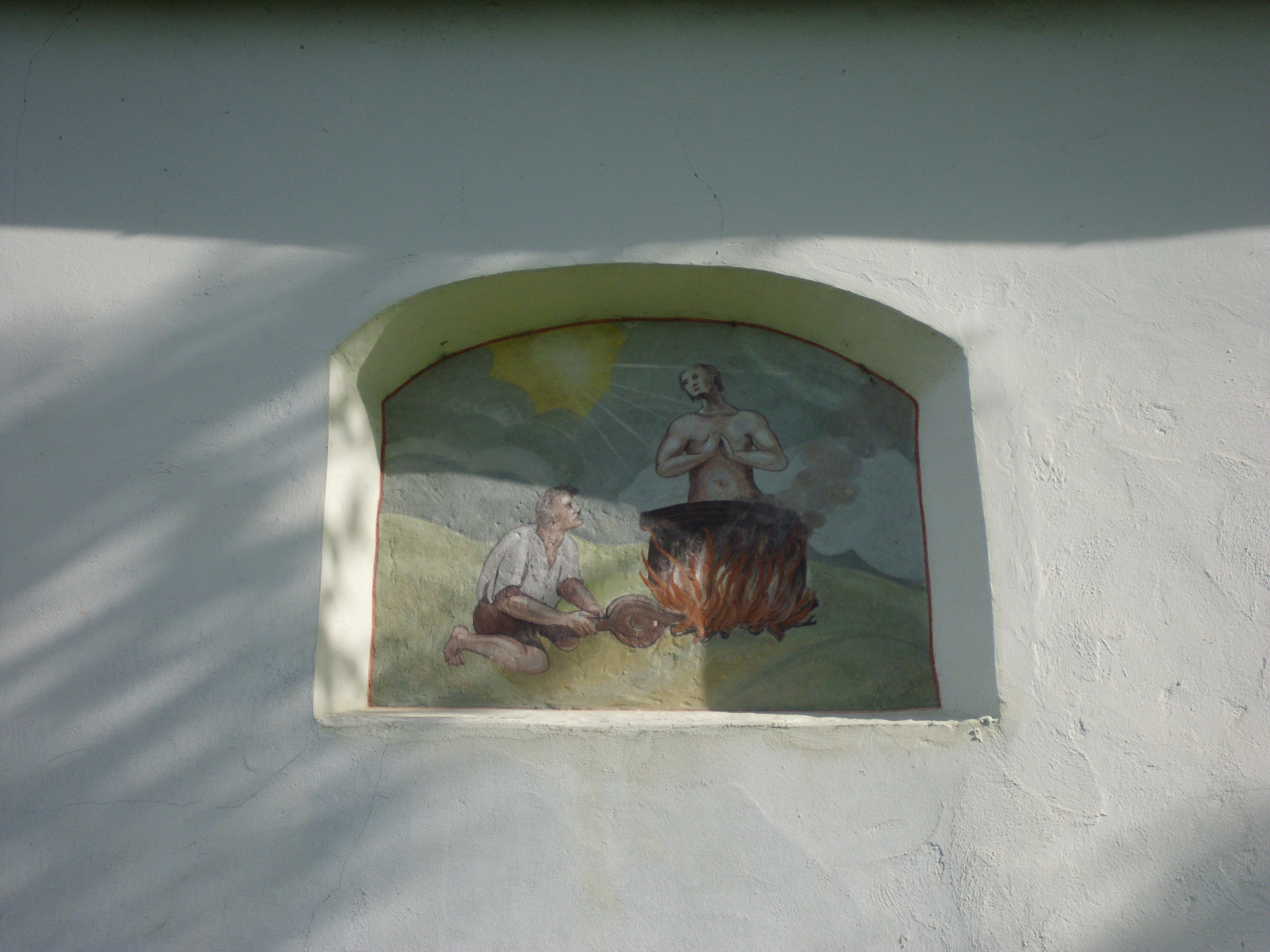 Treidelheim, Ortsteil von Rennertshofen im Landkreis Neuburg-Schrobenhausen, Martyrium des hl. Vitus an der Filialkirche St. Vitus